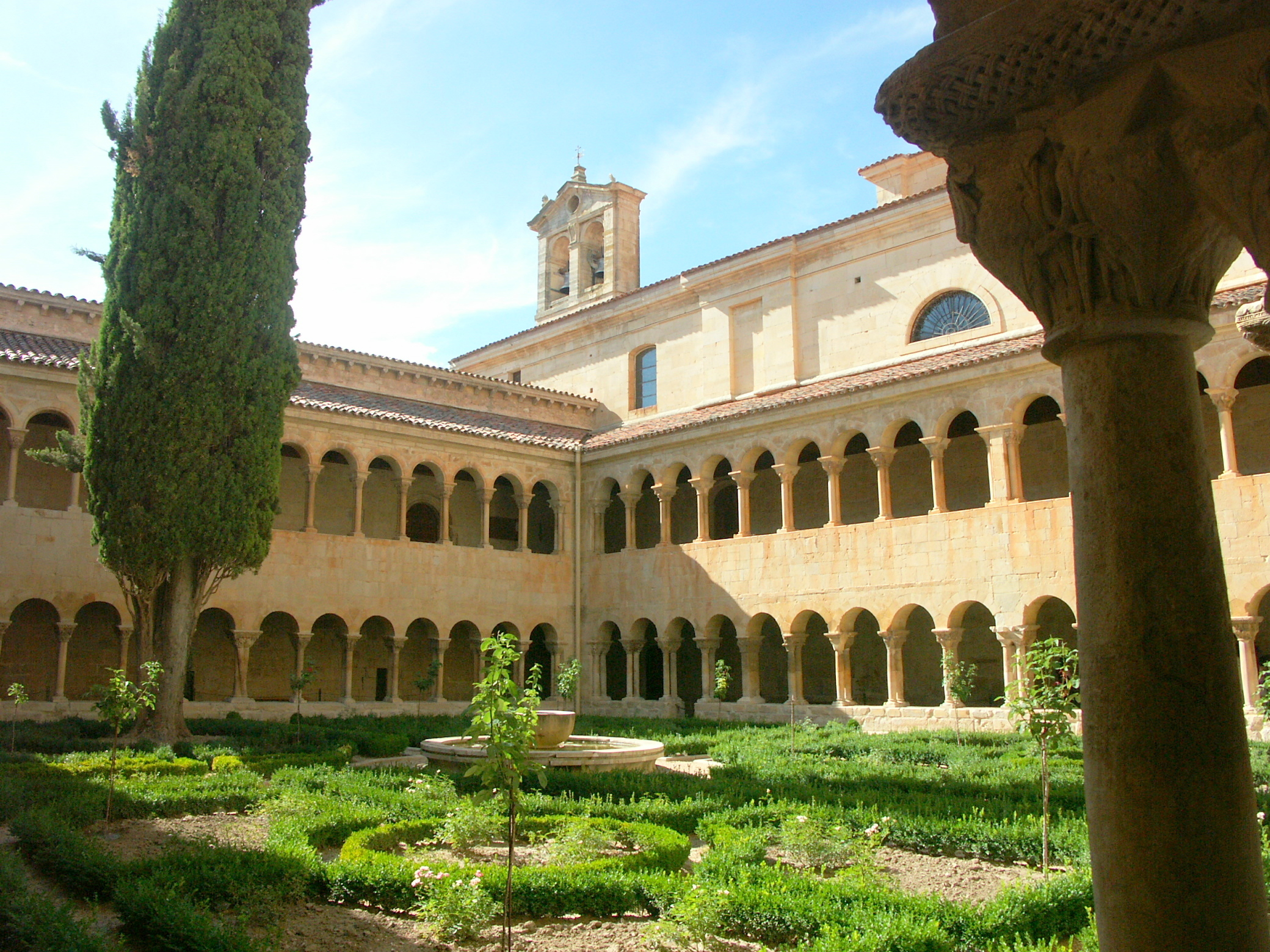 Kreuzgang - links eine der gedrehten Vierersäulen